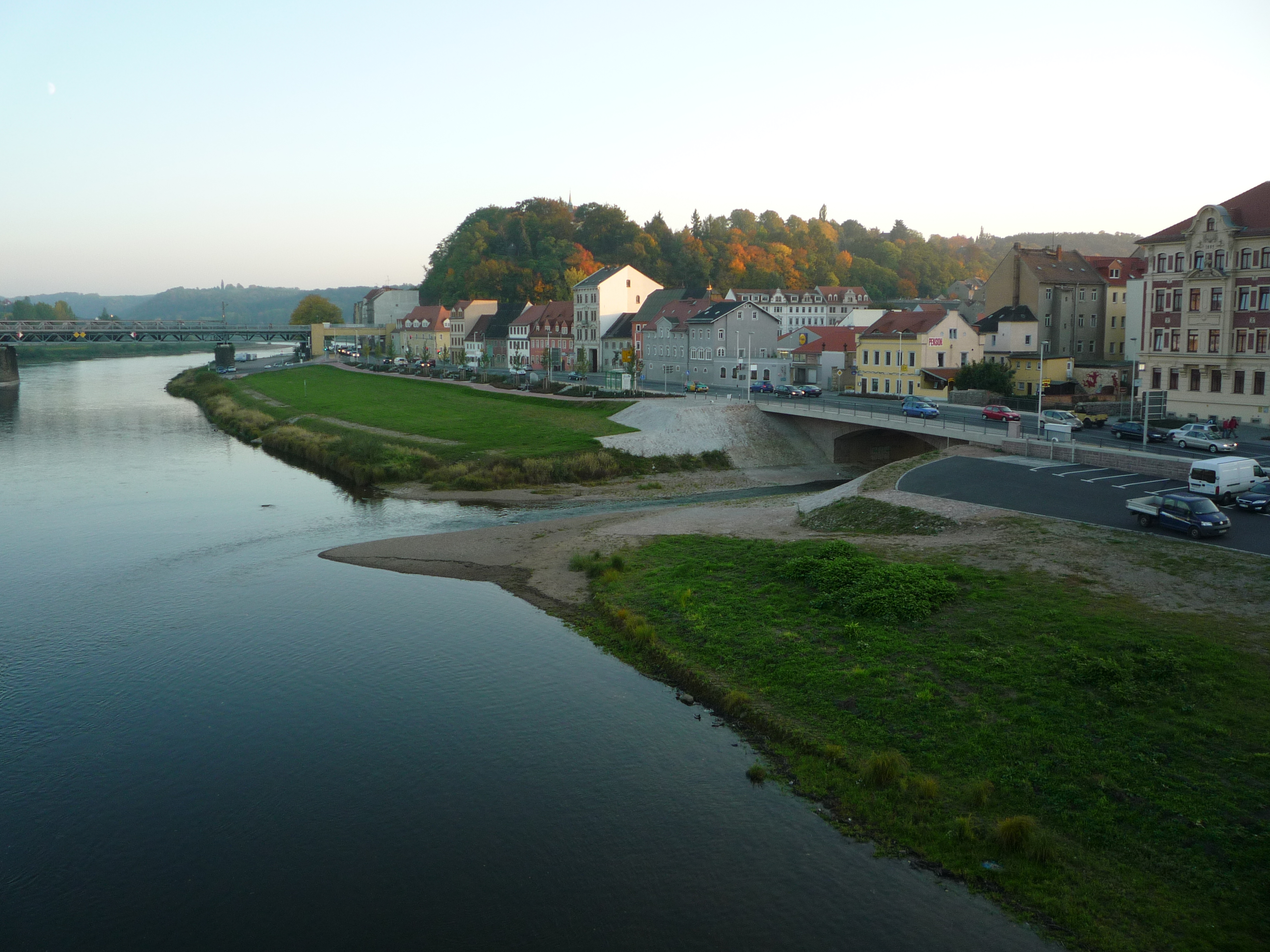 Zufluss der Triebisch in die Elbe in Meißen, gesehen von der Altstadtbrücke